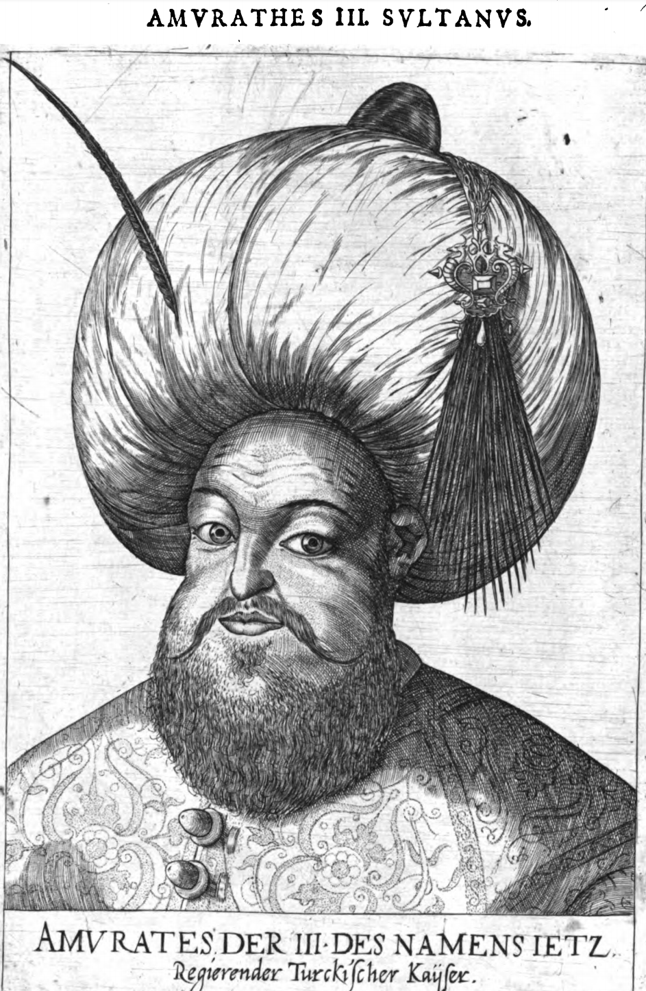 Amurates III. Turcarum Sultán.